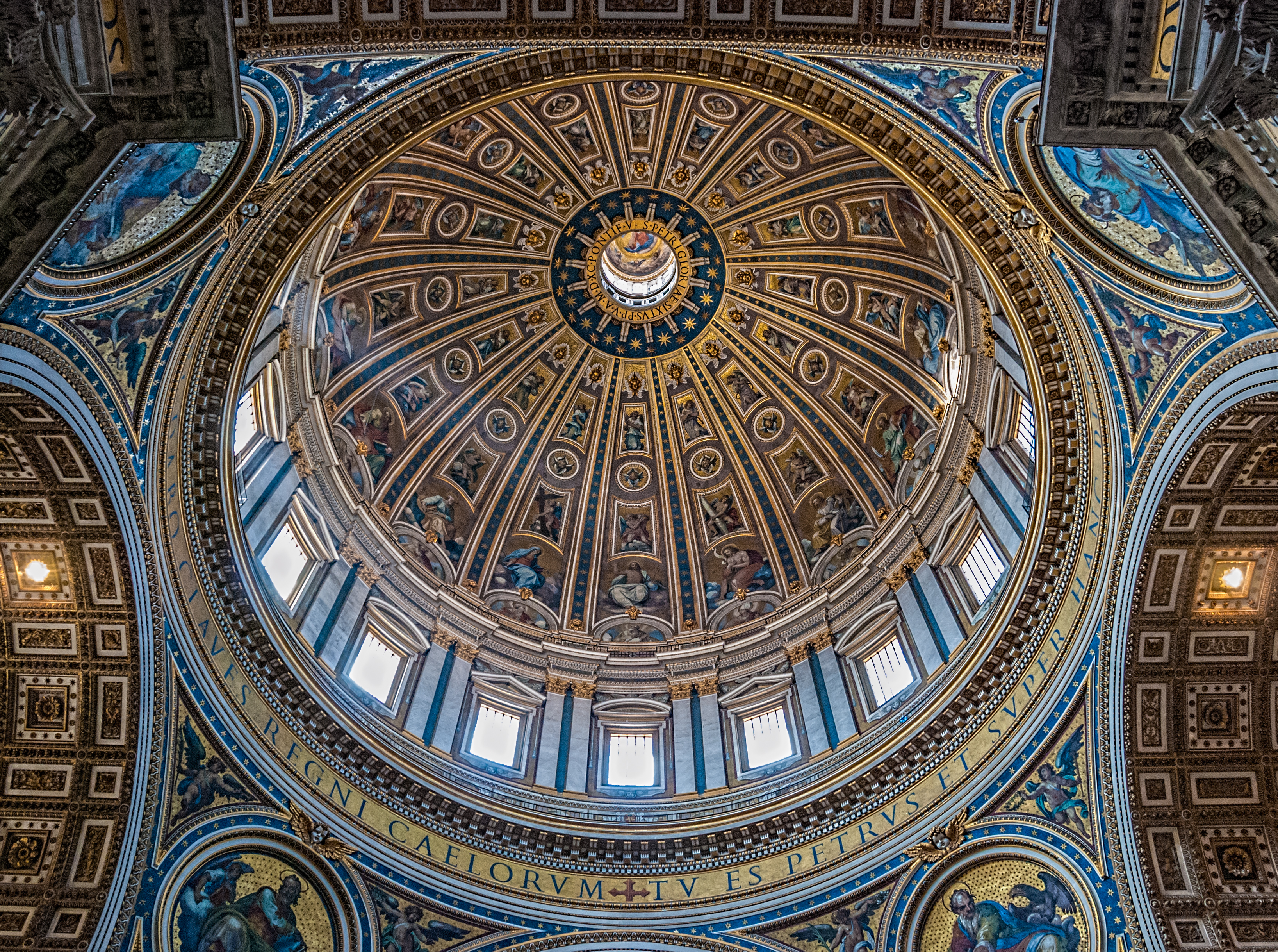 Basilica di San Pietro, Vatican city